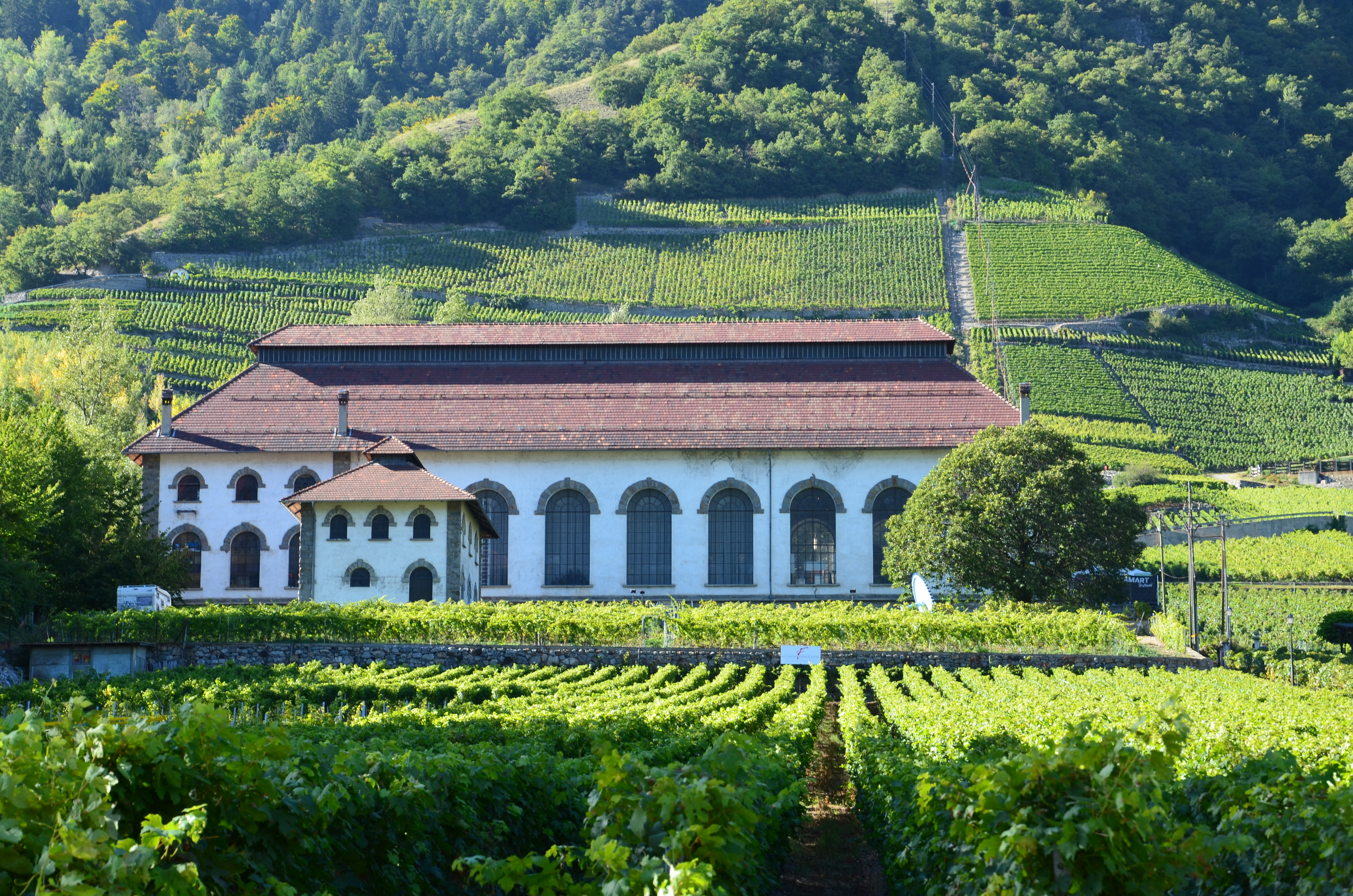 Usine électrique (ancienne usine d'emboutissage)